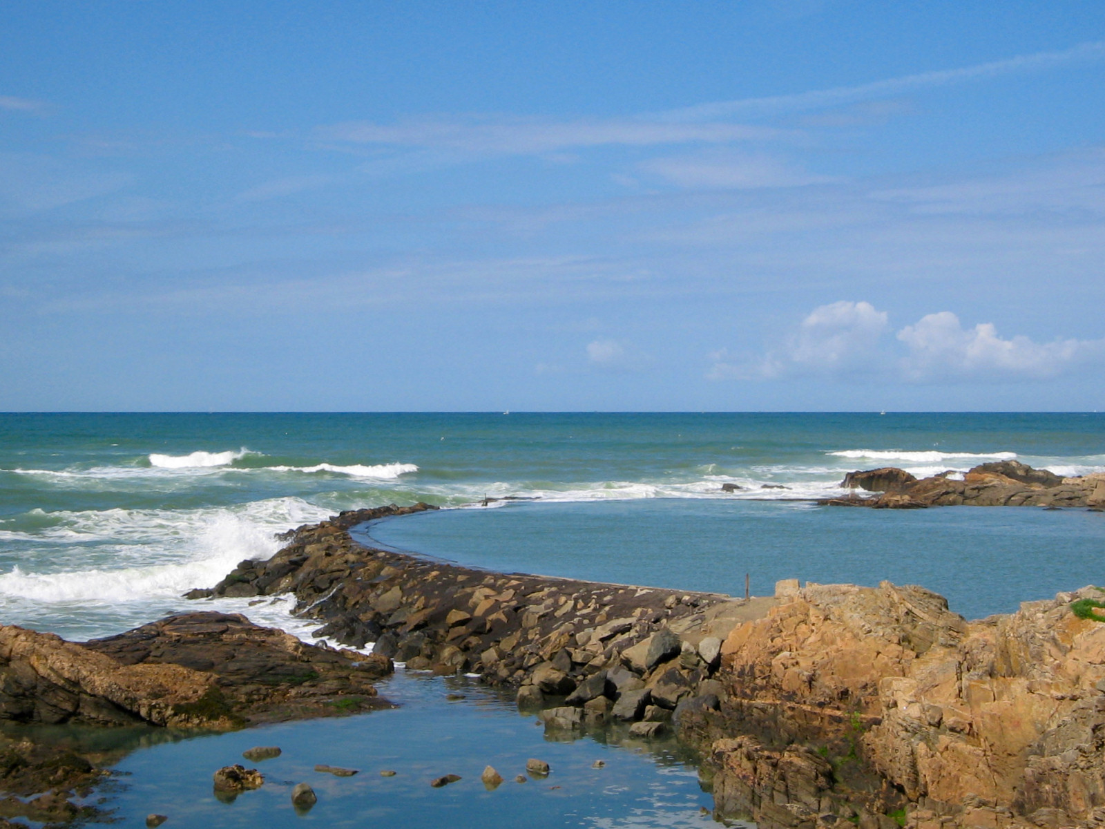 Côte sauvage à la Chaume (commune des Sables d'Olonne en France)